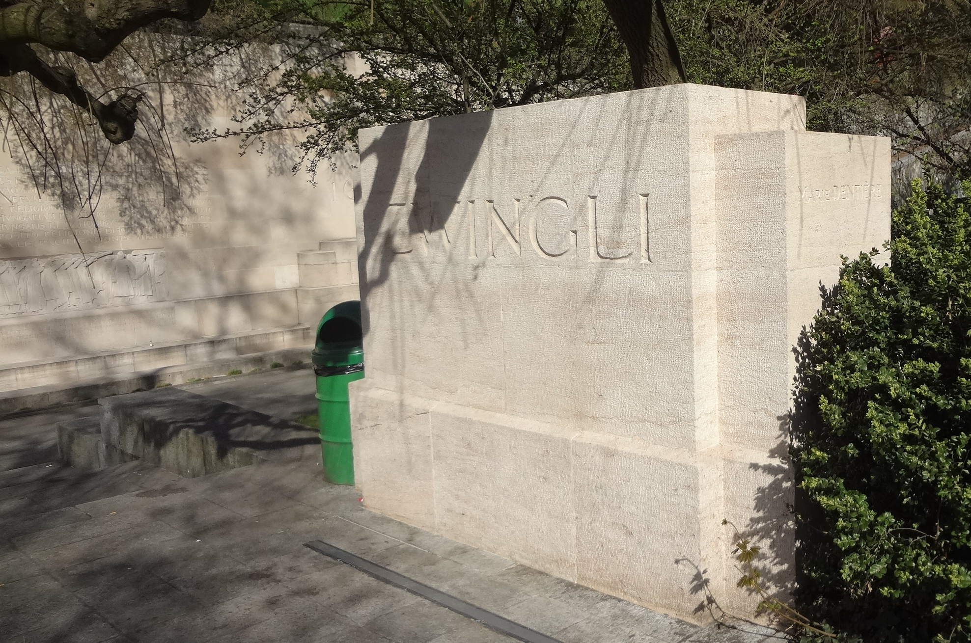 Inscription du nom de Marie Dentière sur le Mur des Réformateurs à Genève, à l'arrière de la stèle dédiée à Zwingli.